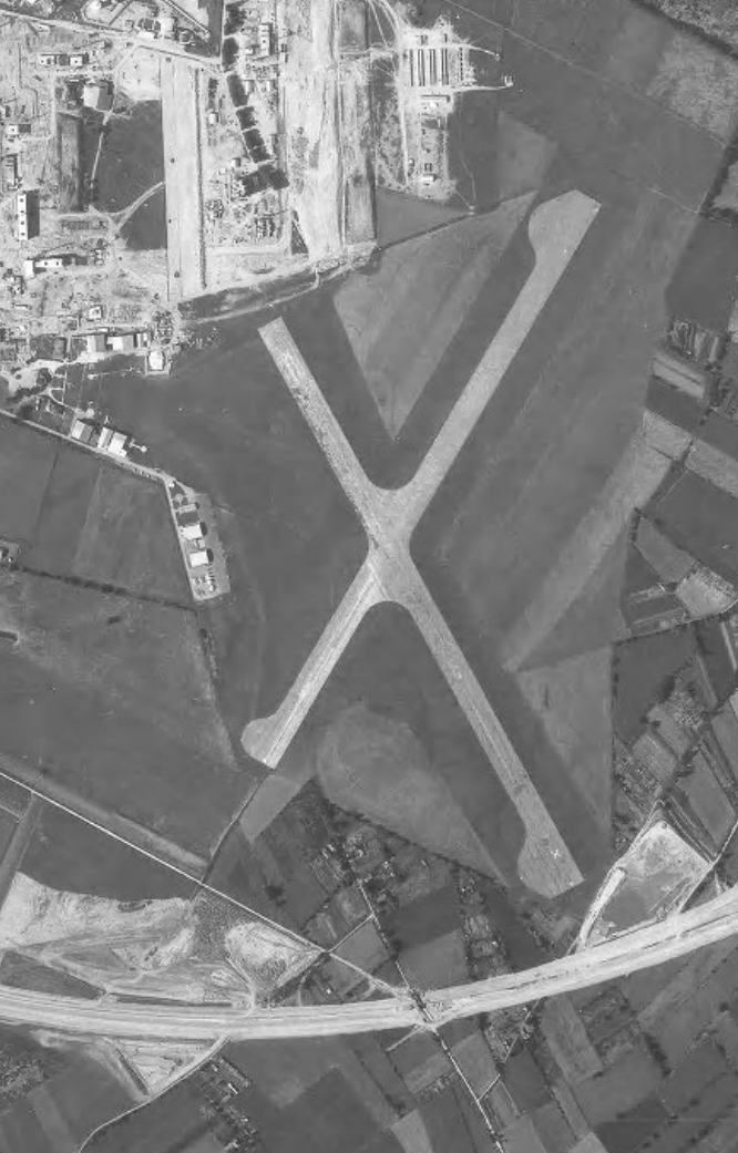 Détail d'une photographie aérienne de l'IGN en août 1966. Aérodrome de Grenoble-Mermoz positionné entre le chantier du village olympique en haut et celui de la rocade sud en bas.